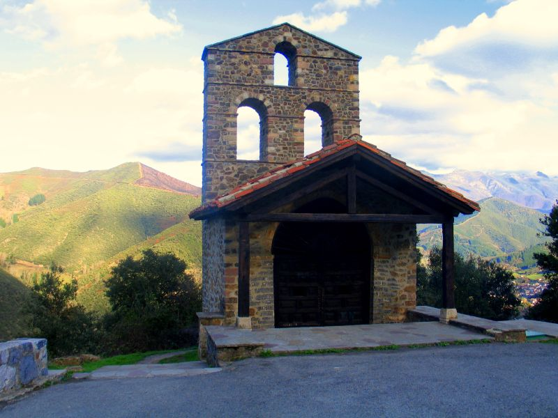 Ermita de San Miguel, en Turieno (Cantabria, España).